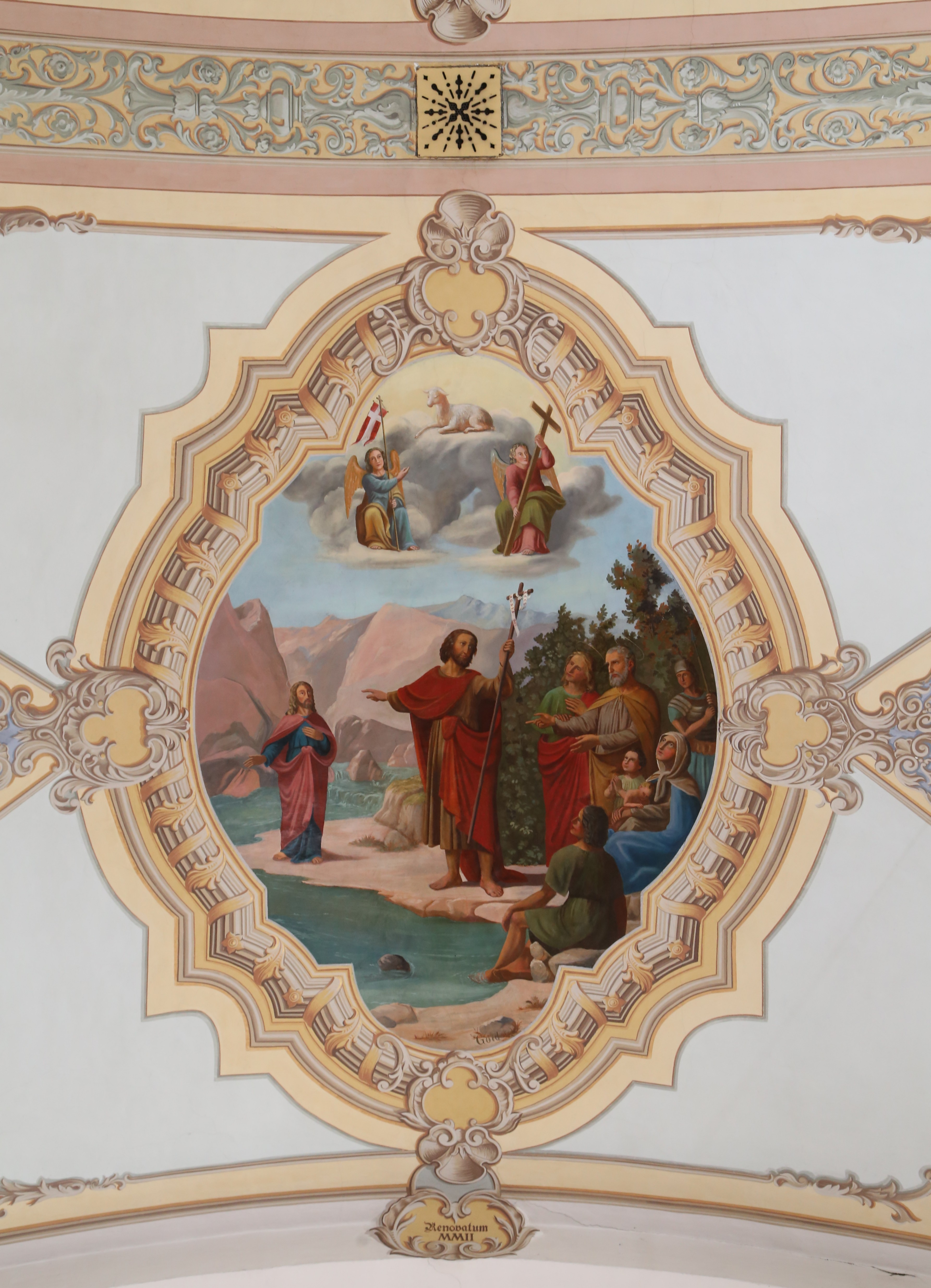 Pfarrkirche Sankt Johannes der Täufer, Walchsee This media shows the remarkable cultural object in the Austrian state of Tyrol listed by the Tyrolean Art Cadastre with the ID 2356. (on tirisMaps, pdf, more images on Commons)